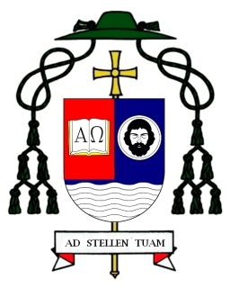 Bischof Marian Gołębiewski *1937, Wappen des Bischofs von Koszalin-Kołobrzeg (2007-)